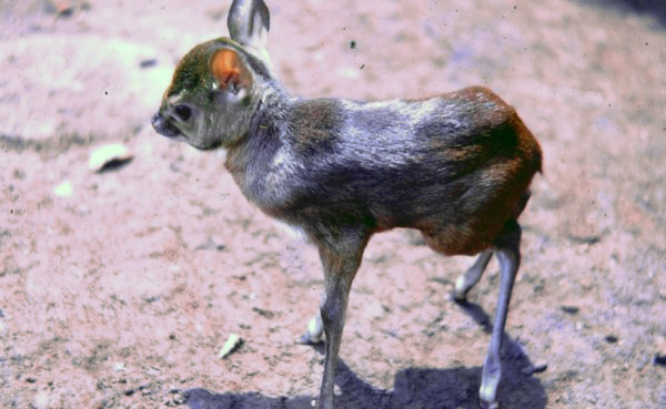 Kuningasantiloopin vasa.